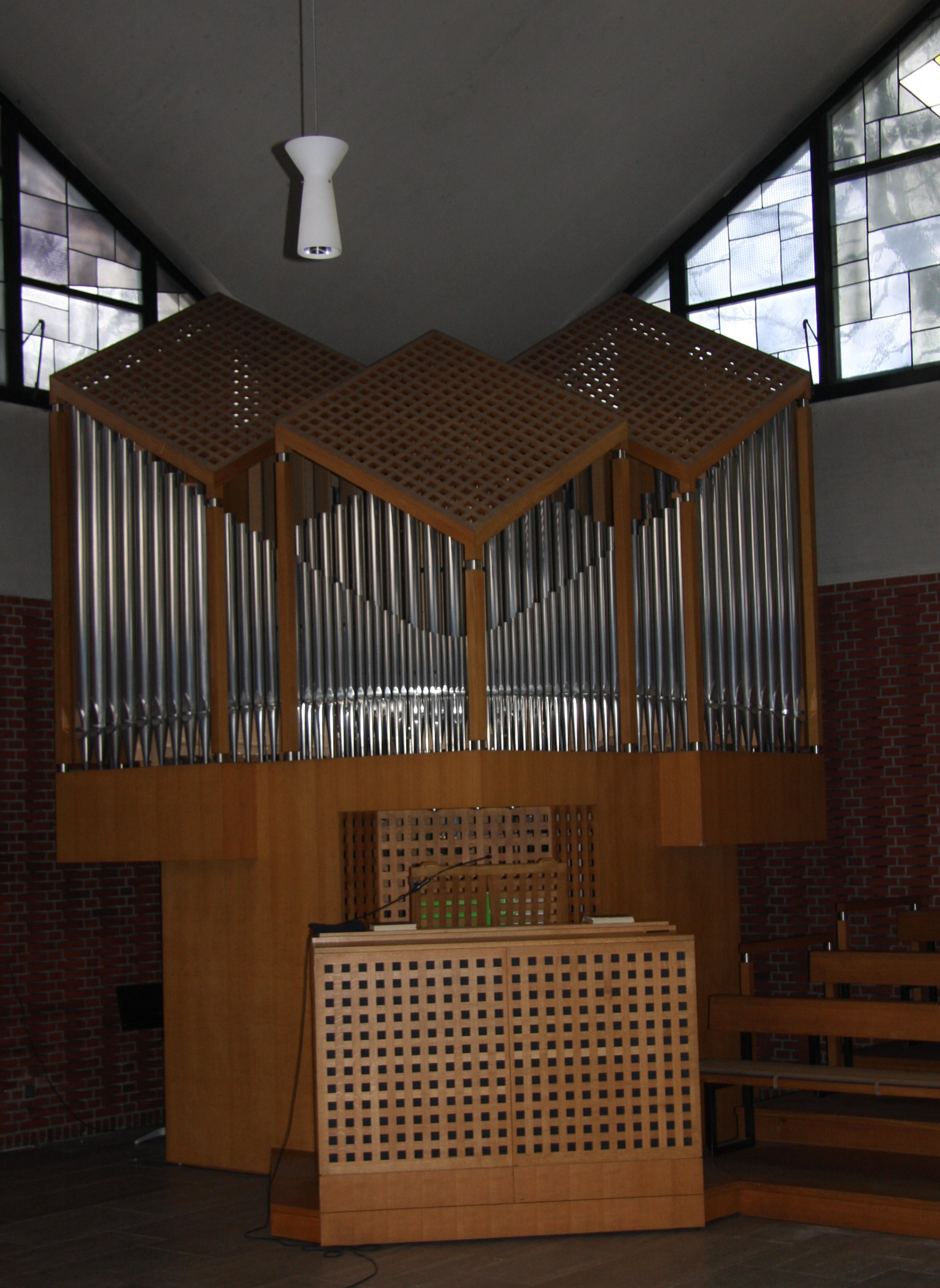 Orgel St. Franz Xaver